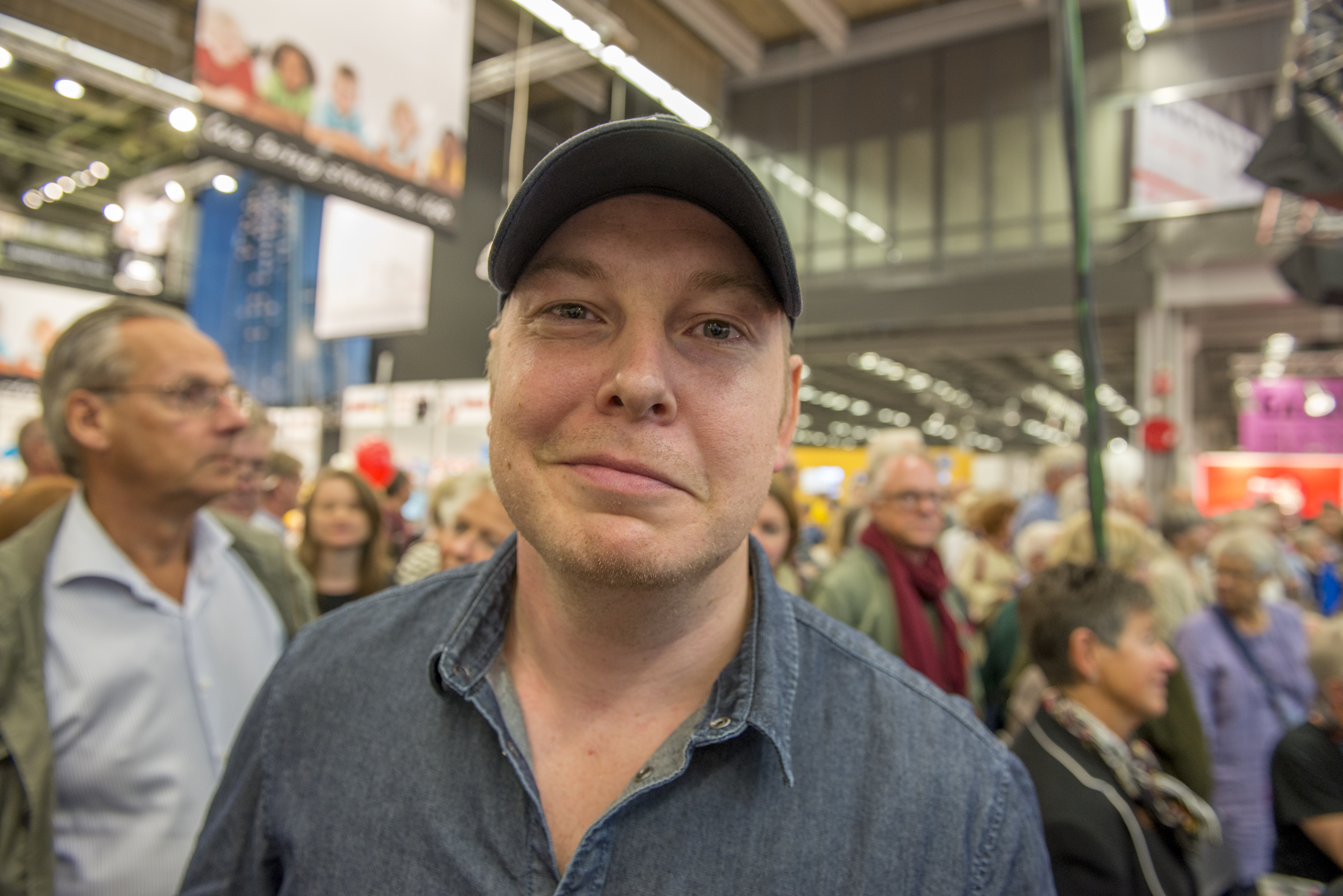 Fredrik Backman på Bok- och biblioteksmässan 2013.